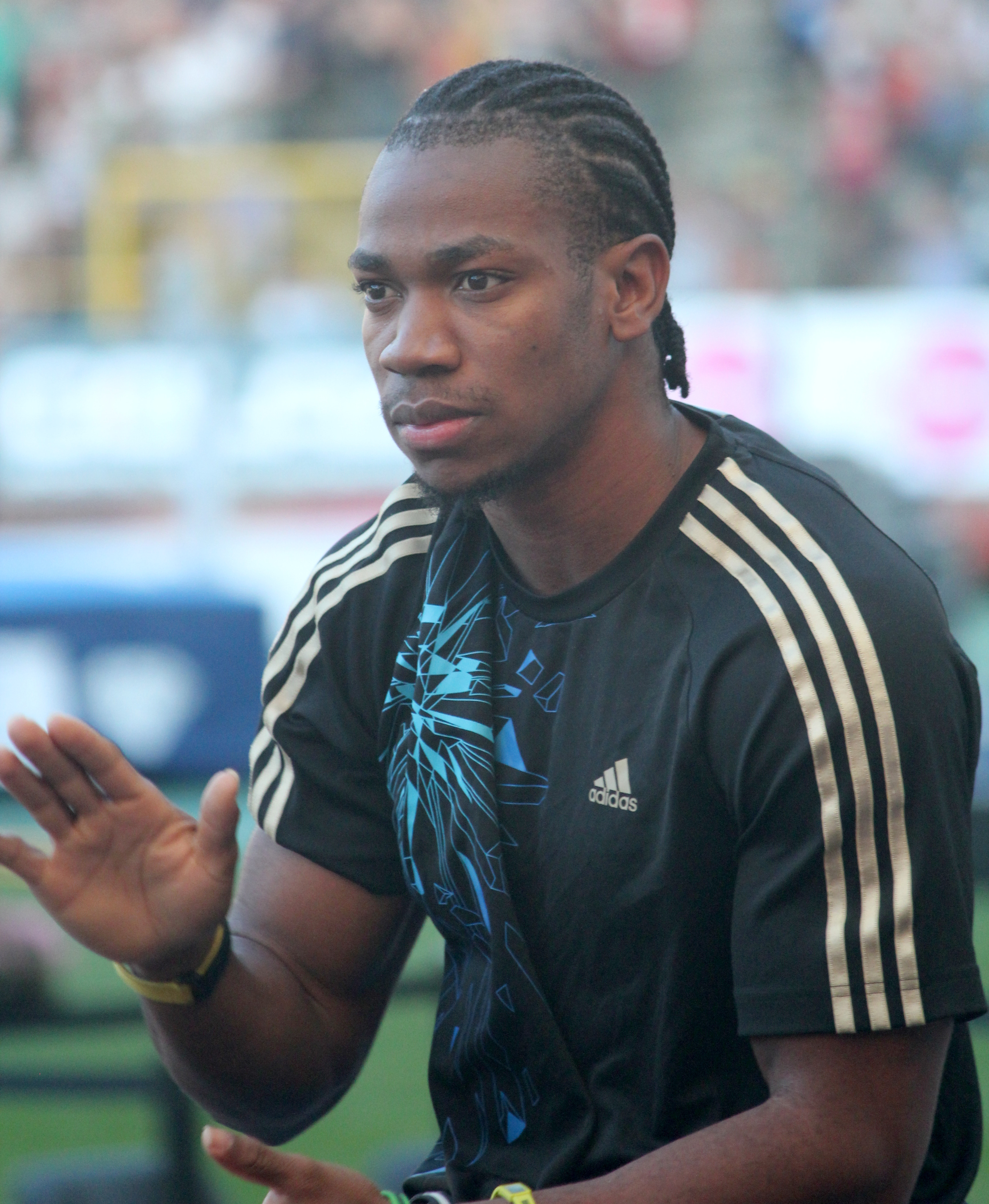 Brussels, Memorial Van Damme, Yohan Blake